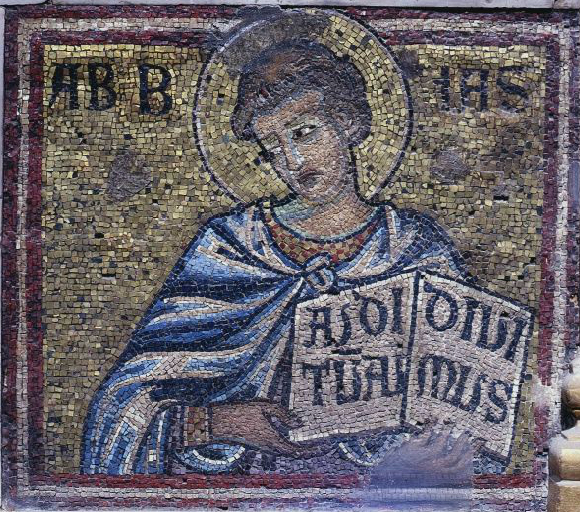 Gaddo gaddi, abdia